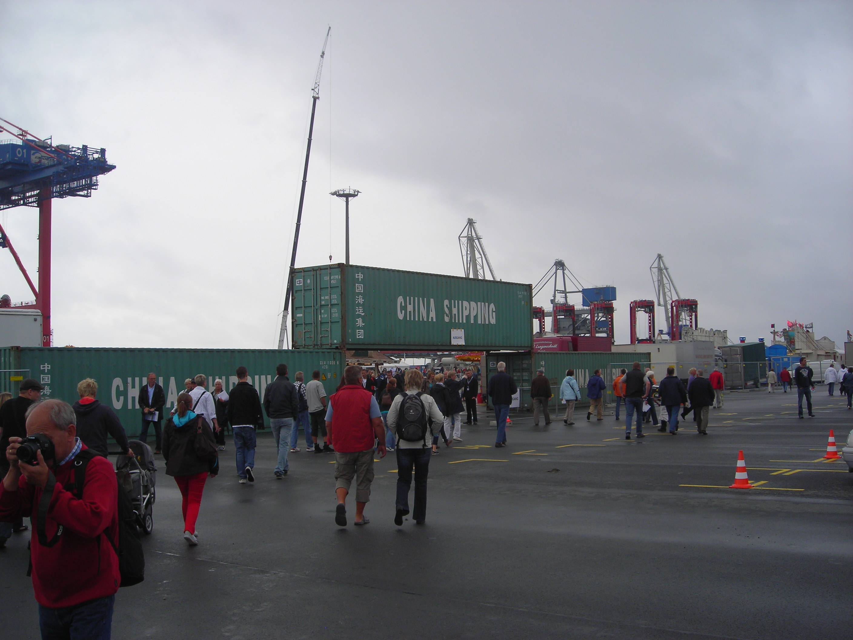 Tag der offenen Tür auf dem Gelände des JadeWeserPorts